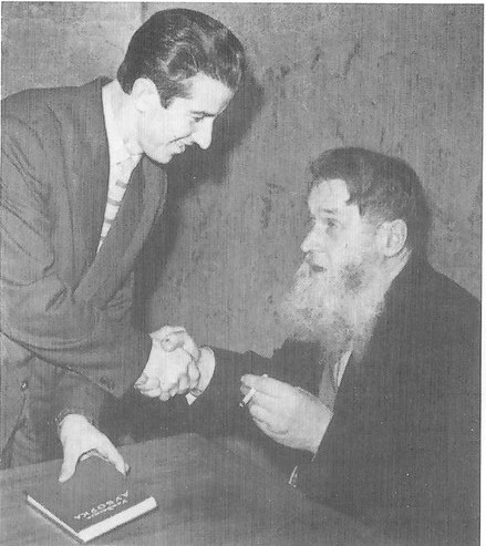 Беларускі паэт Уладзімер Дубоўка з Рыгорам Барадуліным, 1961 г.